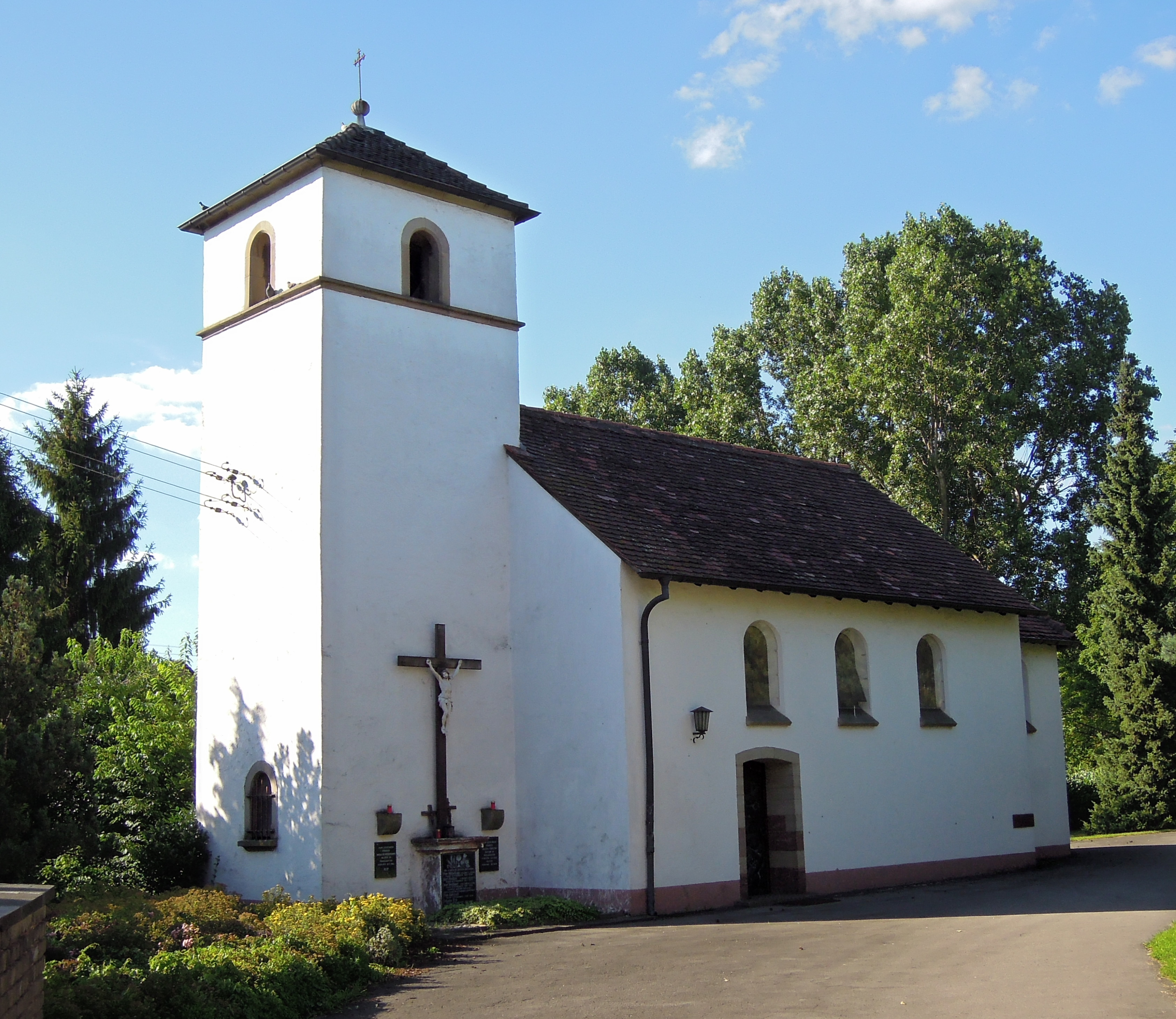 St. Apollonia Rodener Straße, Friedhofskapelle St. Apollonia vor 1870 (Einzeldenkmal